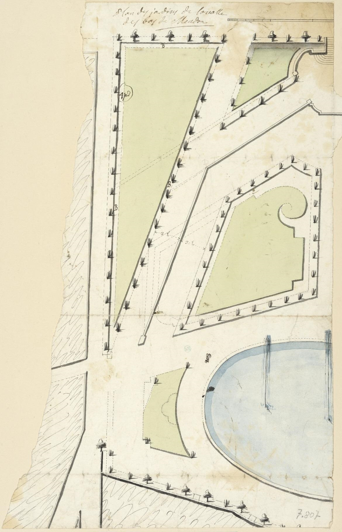 Dessin d'André Le Nôtre projetant une modification du parterre de l'Ovale, jardins bas de Meudon. Nationalmuseum de Stockholm.